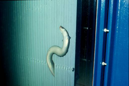 Ethohydraulik: Aal auf einem Gitter.